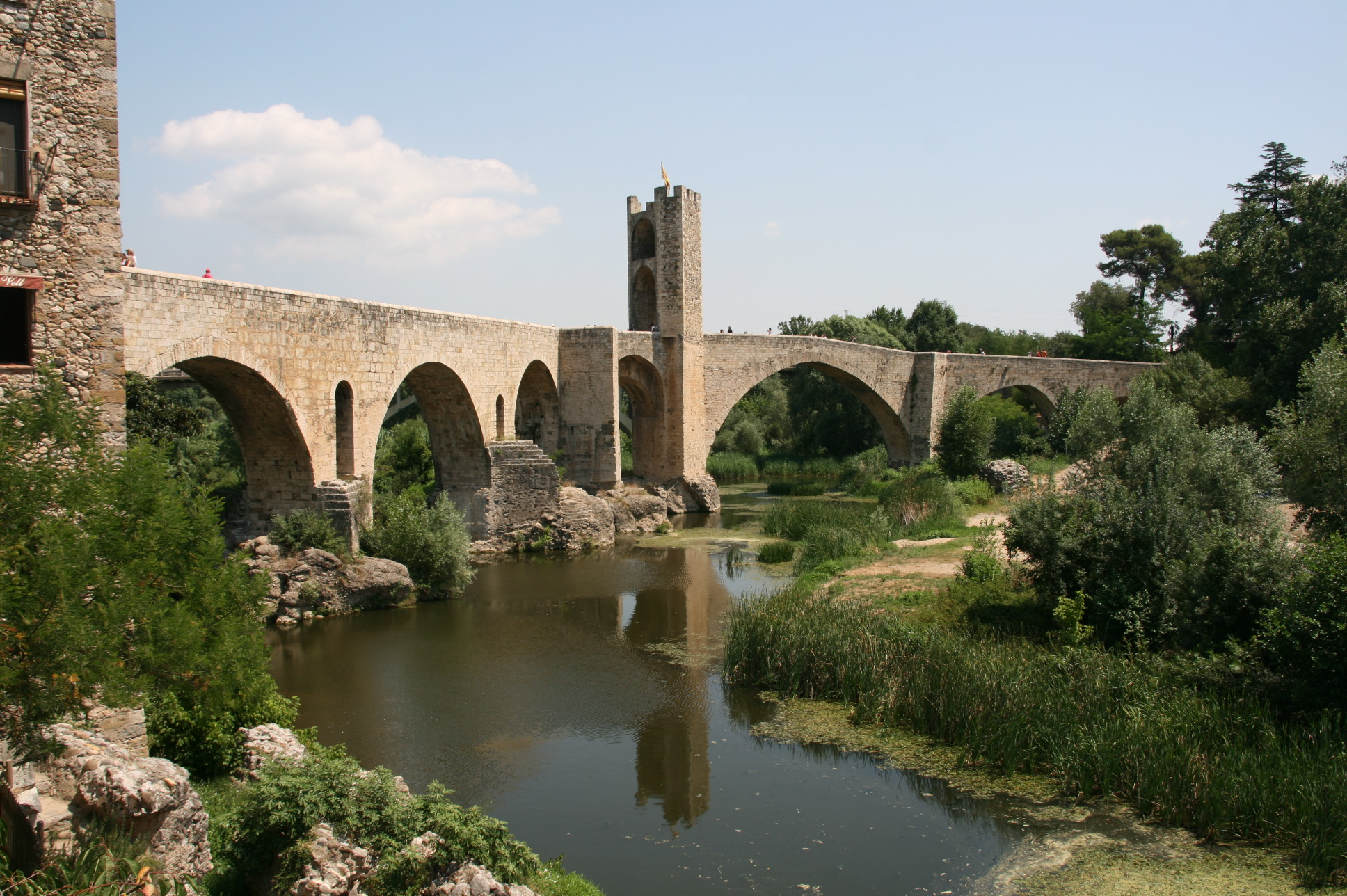 Pont Medieval de Besalú